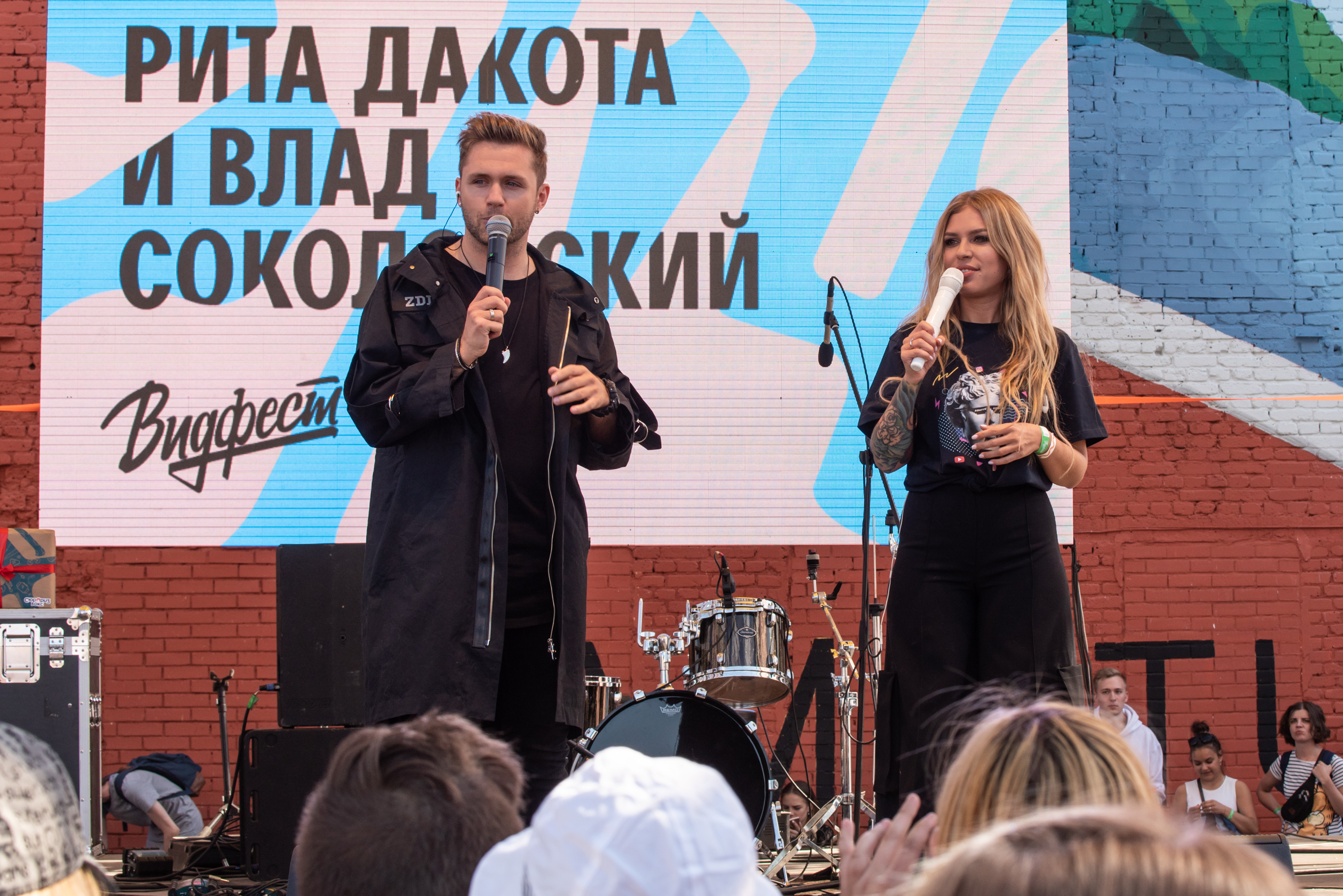 Влад Соколовский и Рита Дакота 26 мая 2018 года на фестивале «Видфест» в Санкт-Петербурге